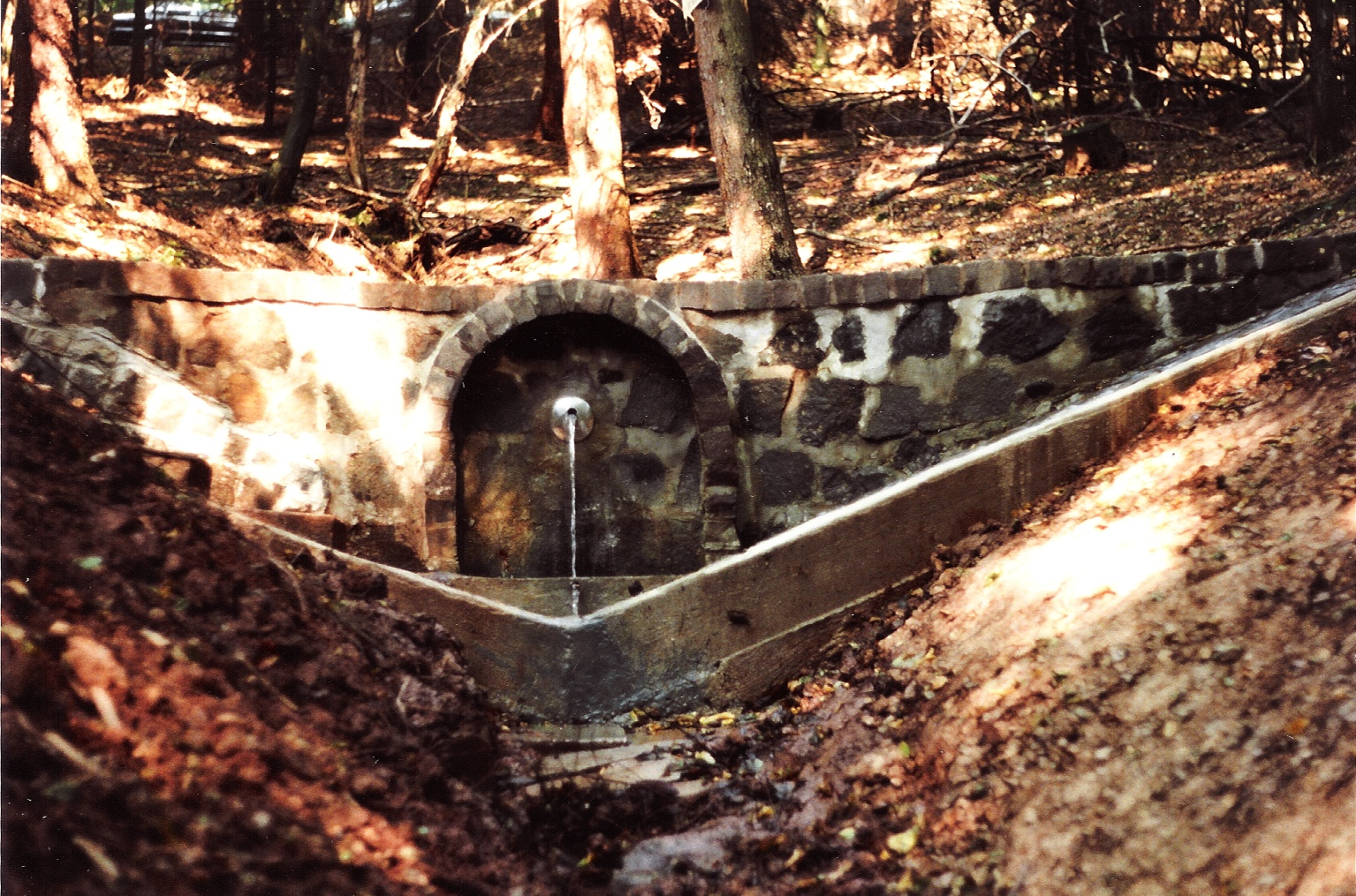 Der Schlangenbrunnen ist eine eingefasste Quelle im Olsbrücker Tierwald. Diese Aufnahme stammt aus dem Jahre 1989